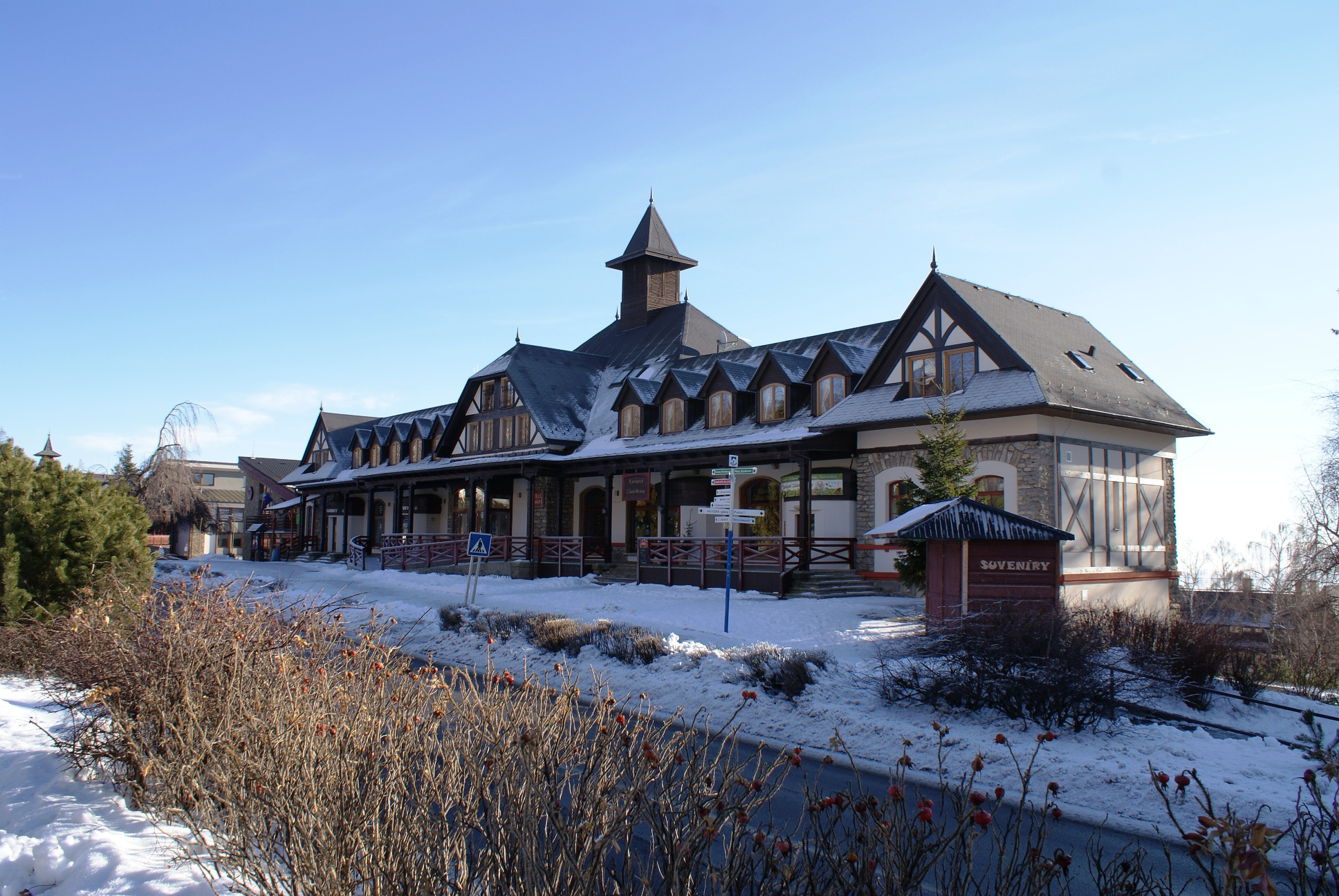 Bývalý Kúpeľný dom bol po 2.sv.vojne načas bankou a potom slúžil ako Dom potravín . Dnes je v ňom viac podnikateľských subjektov.